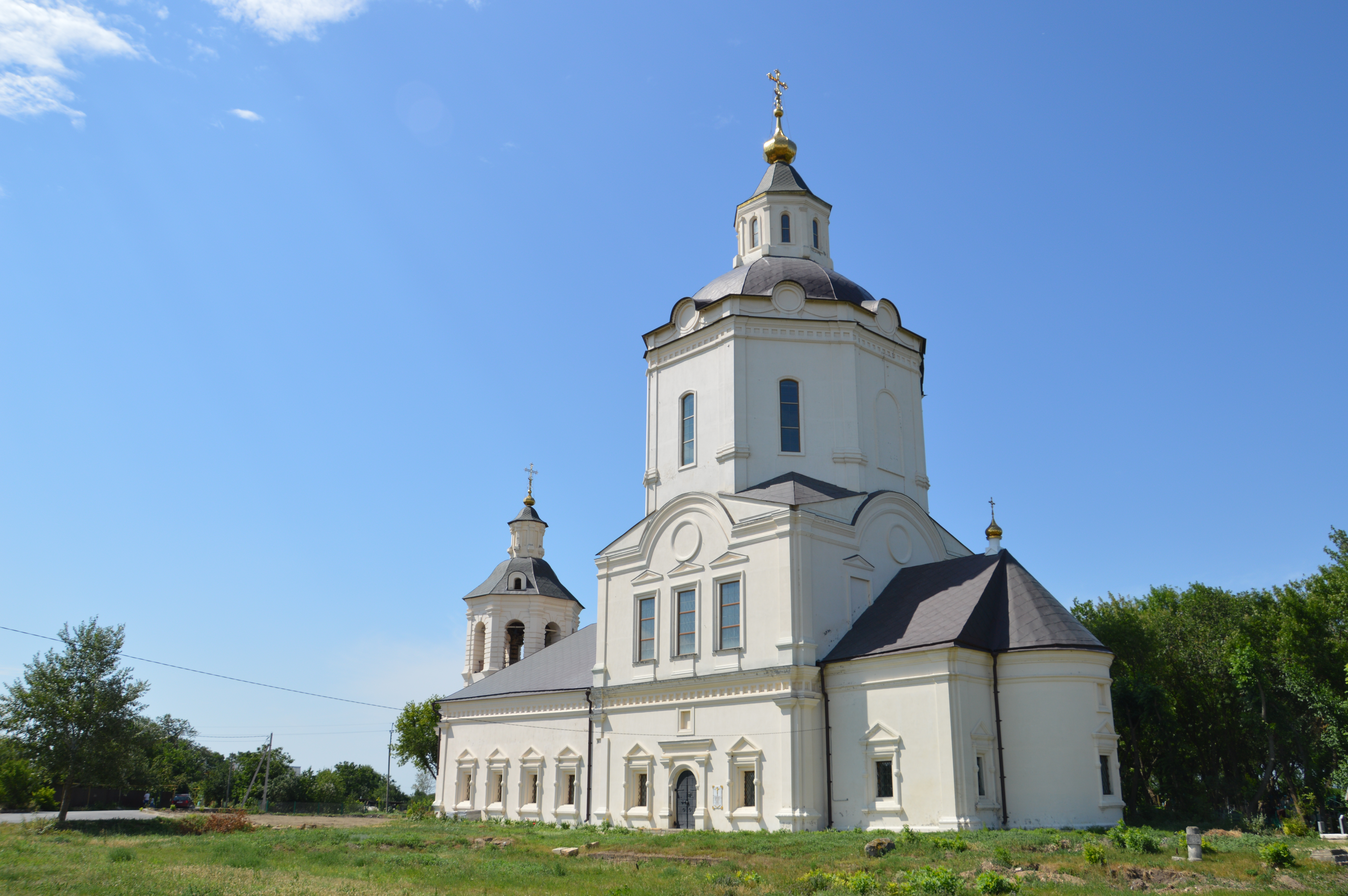 Ратная церковь в Старочеркасске. Внешний вид.